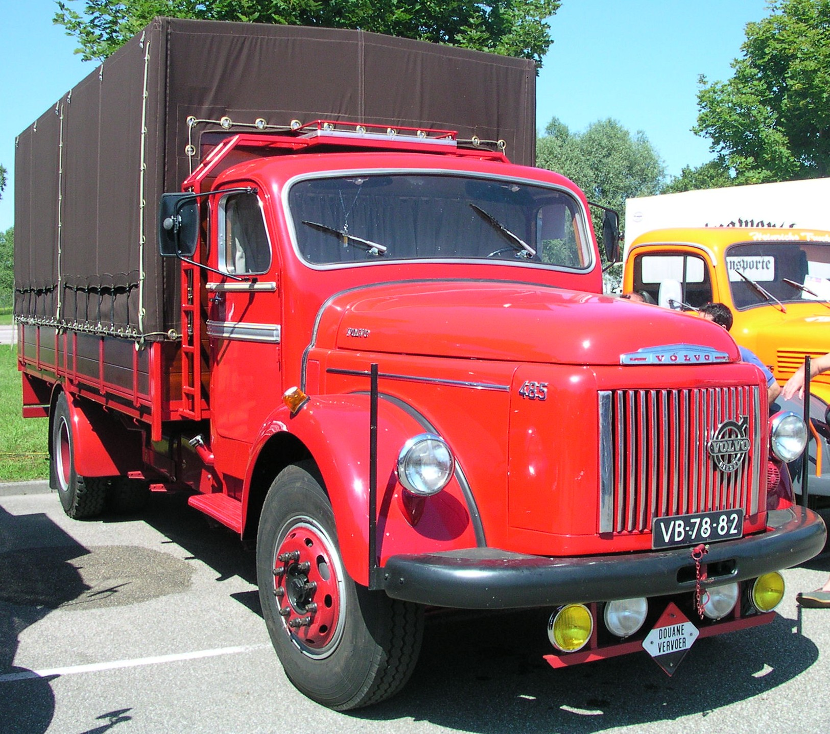 Wörth am Rhein beim Oldtimer-Treffen bei Daimler-Chrysler; Volvo L 485 Pritsche, Baujahr 1961, 124 Kw (168 PS)